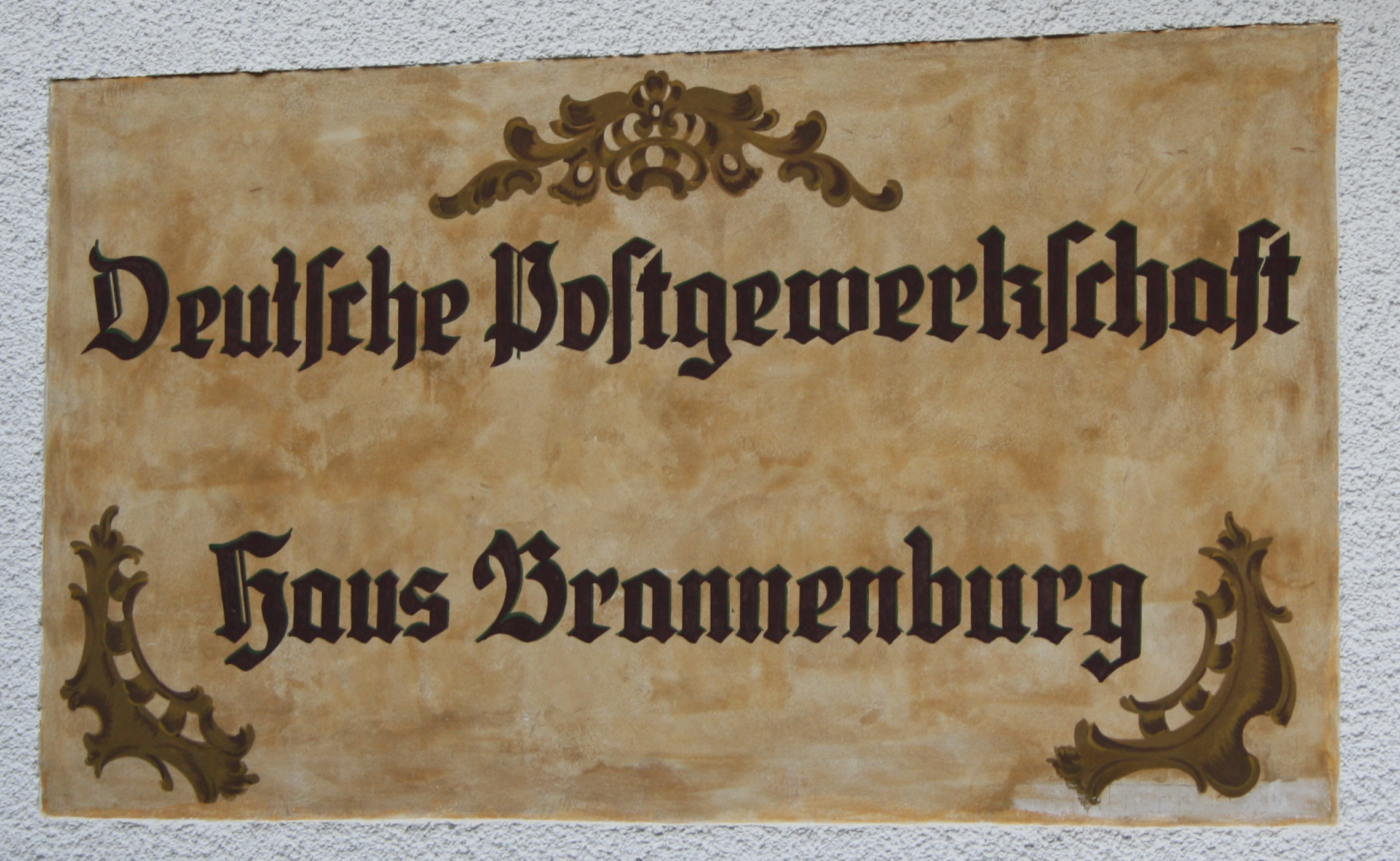 Schriftzug der Deutschen Postgewerkschaft am ver.di Bildungszentrum Haus Brannenburg.